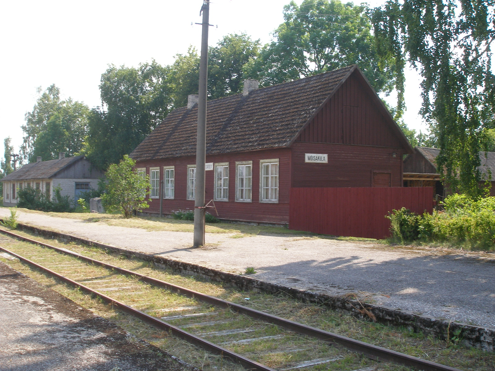 Meizakilas stacijas ēka